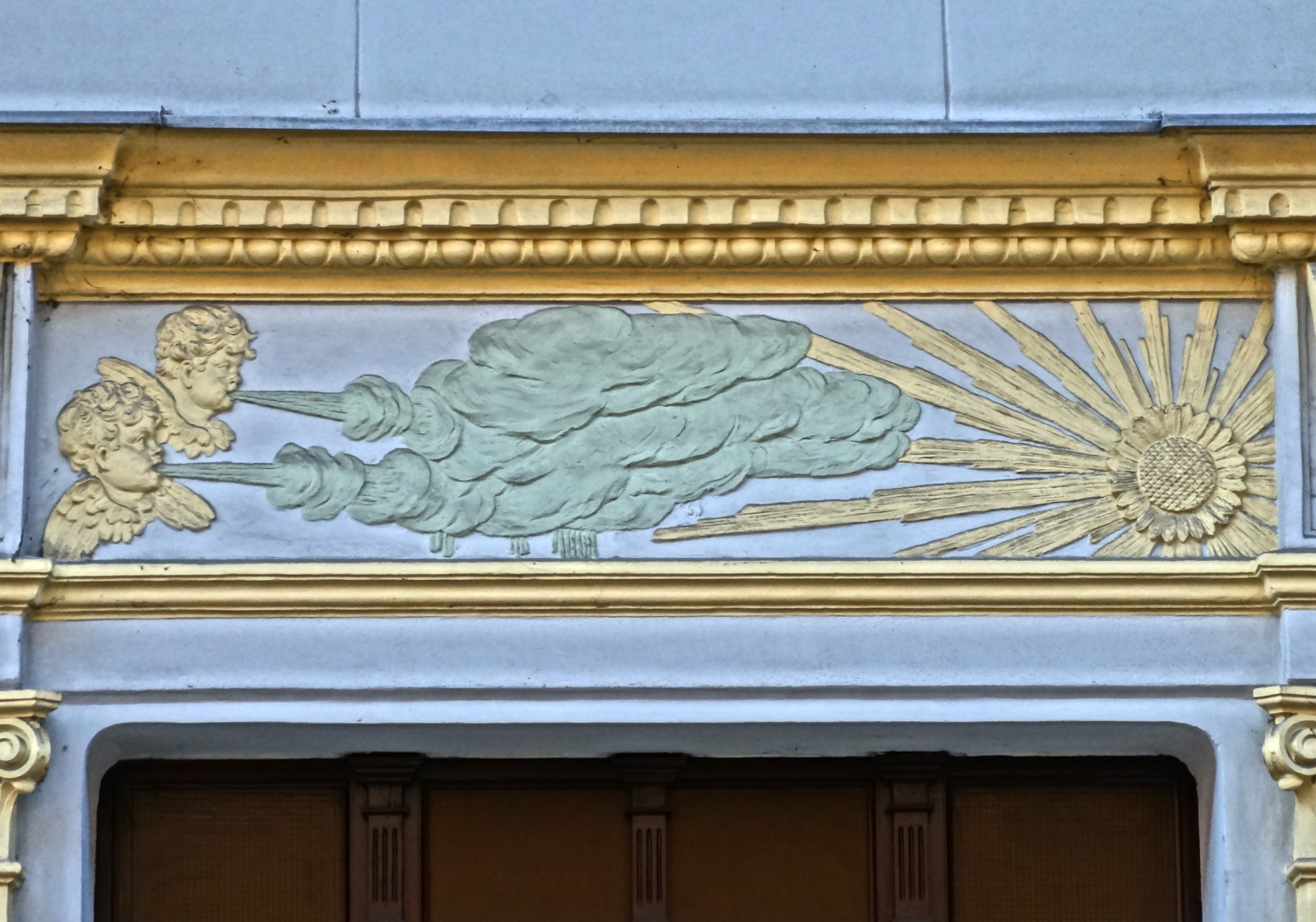 Kamienica przy ul. Cieszkowskiego 11 w Bydgoszczy (1898-1899 Józef Święcicki)